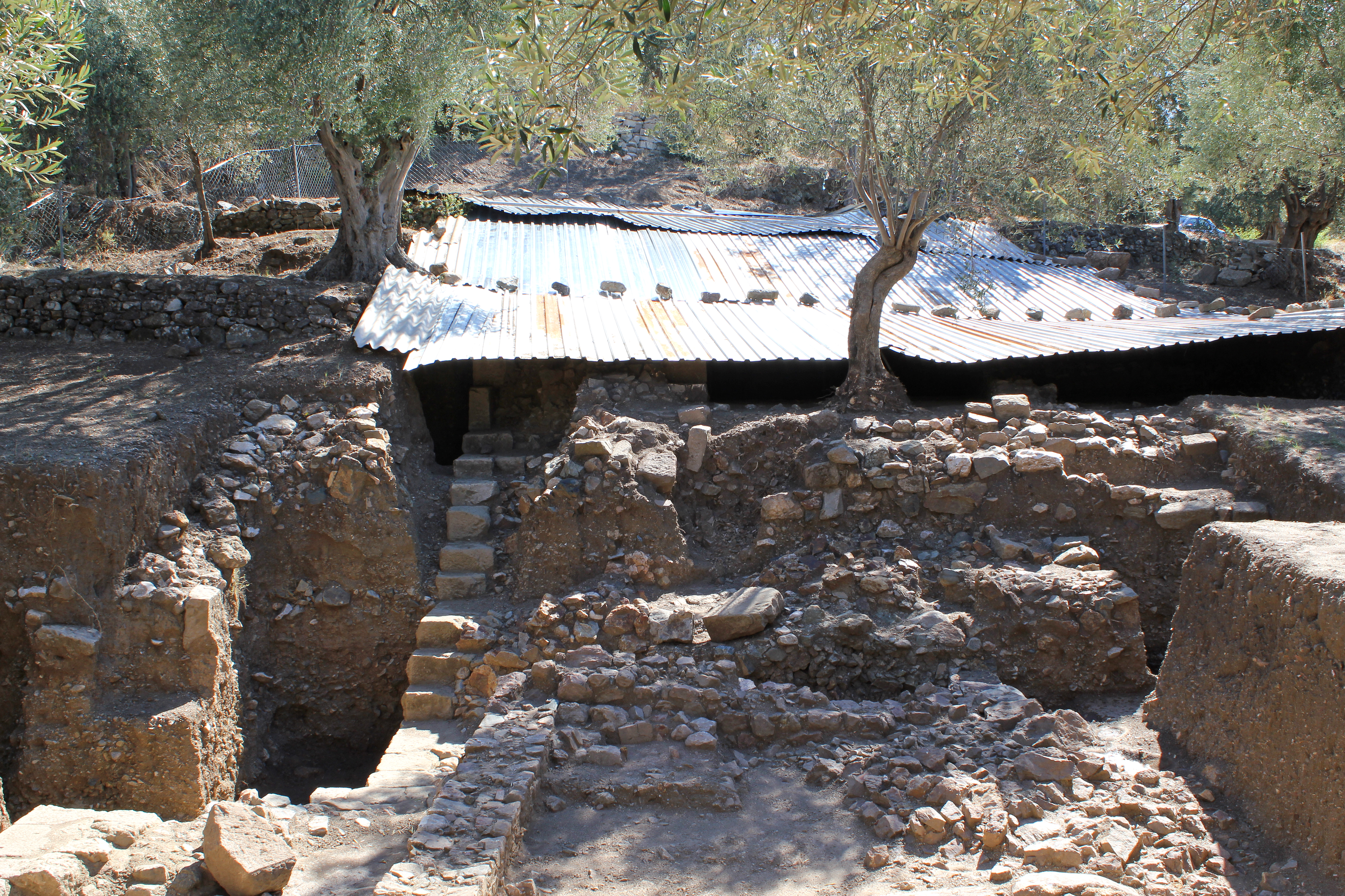 Ausgrabungen in Antandros, Westtürkei